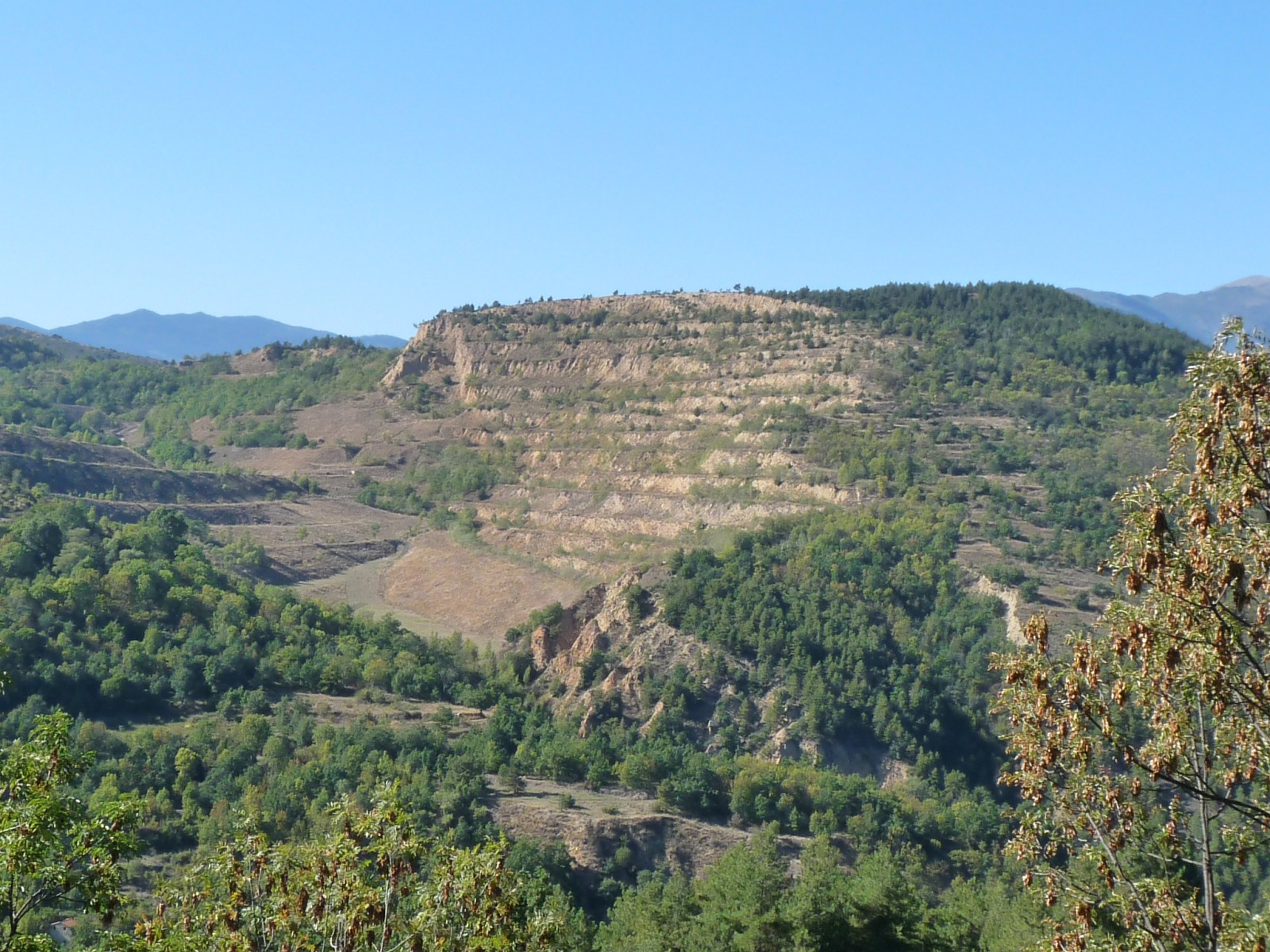 Anciennes mines de fer d'Escaro, Pyrénées-Orientales, France